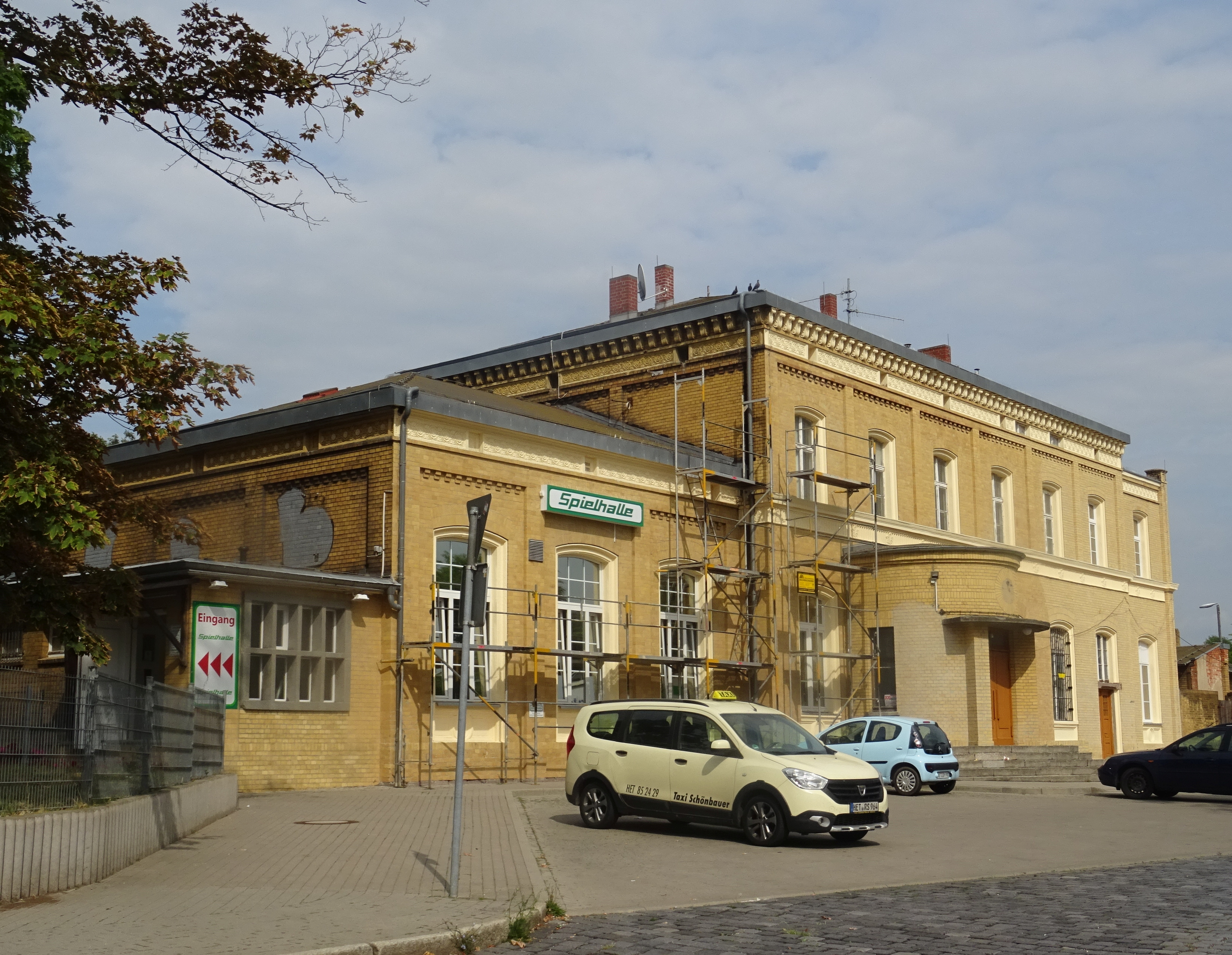 denkmalgeschützter Bahnhof Hettstedt, Straßenseite